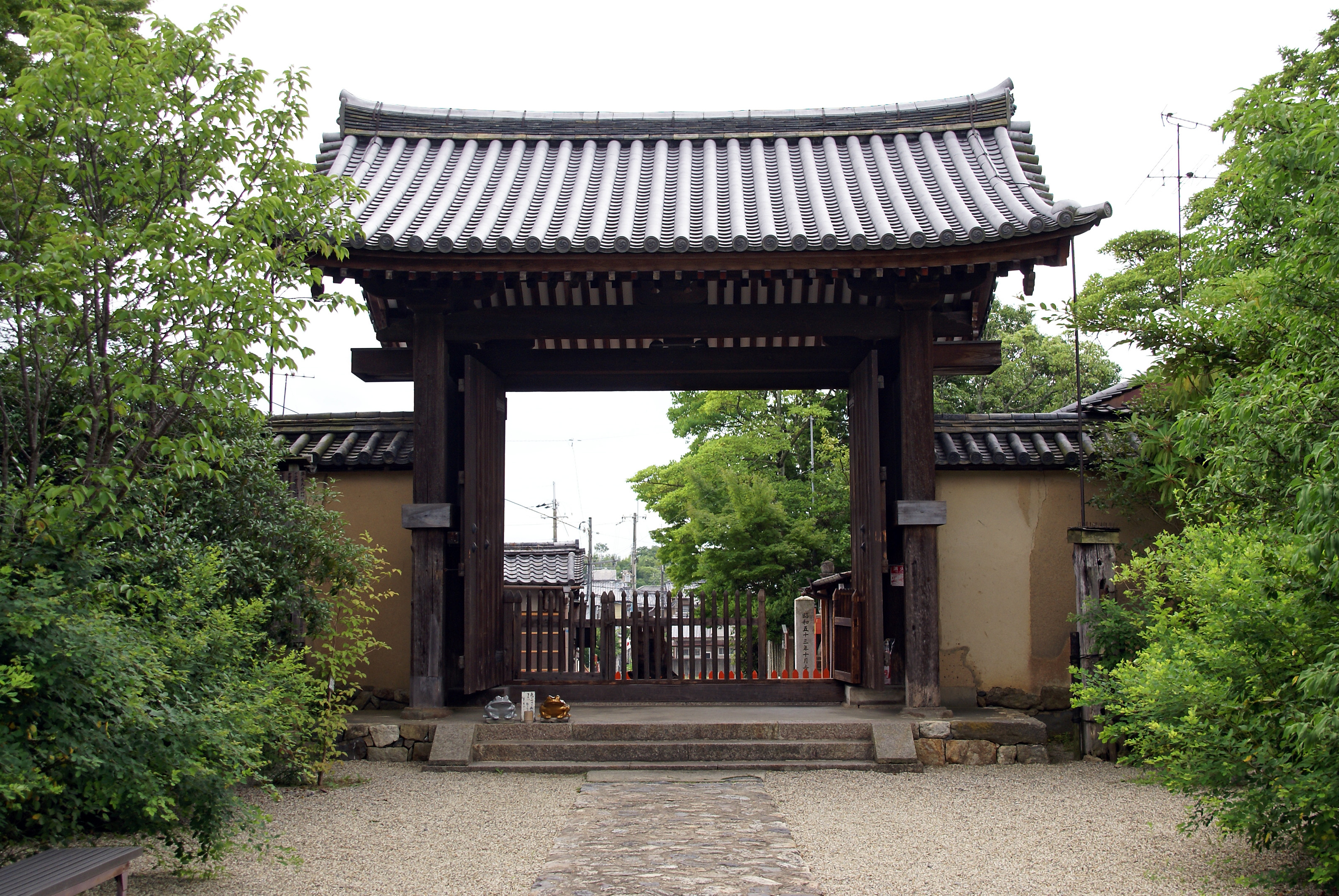 Shin-Yakushiji in Nara, Nara prefecture, Japan